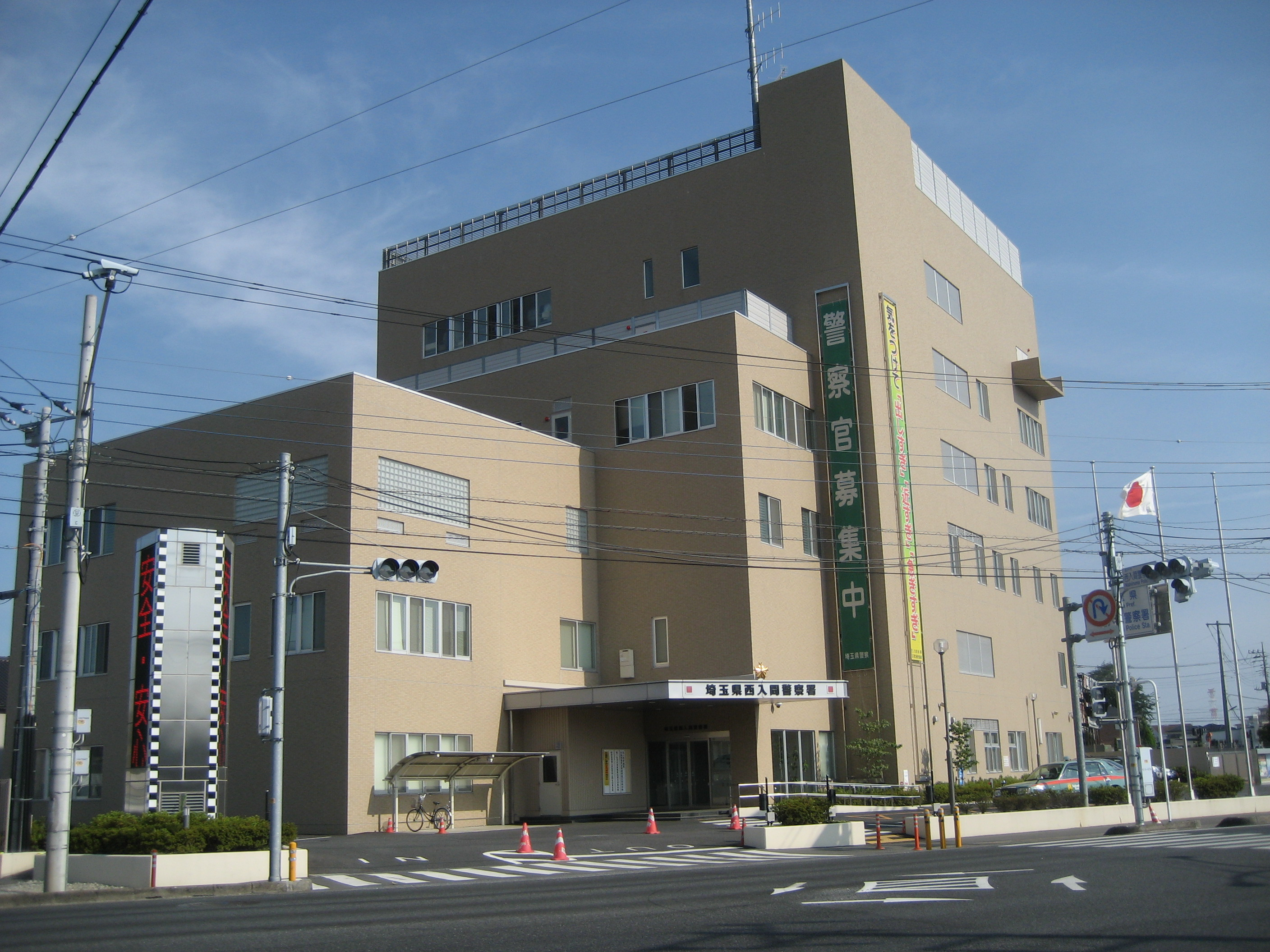 埼玉県西入間警察署庁舎（西入間警察署前交差点付近から撮影）